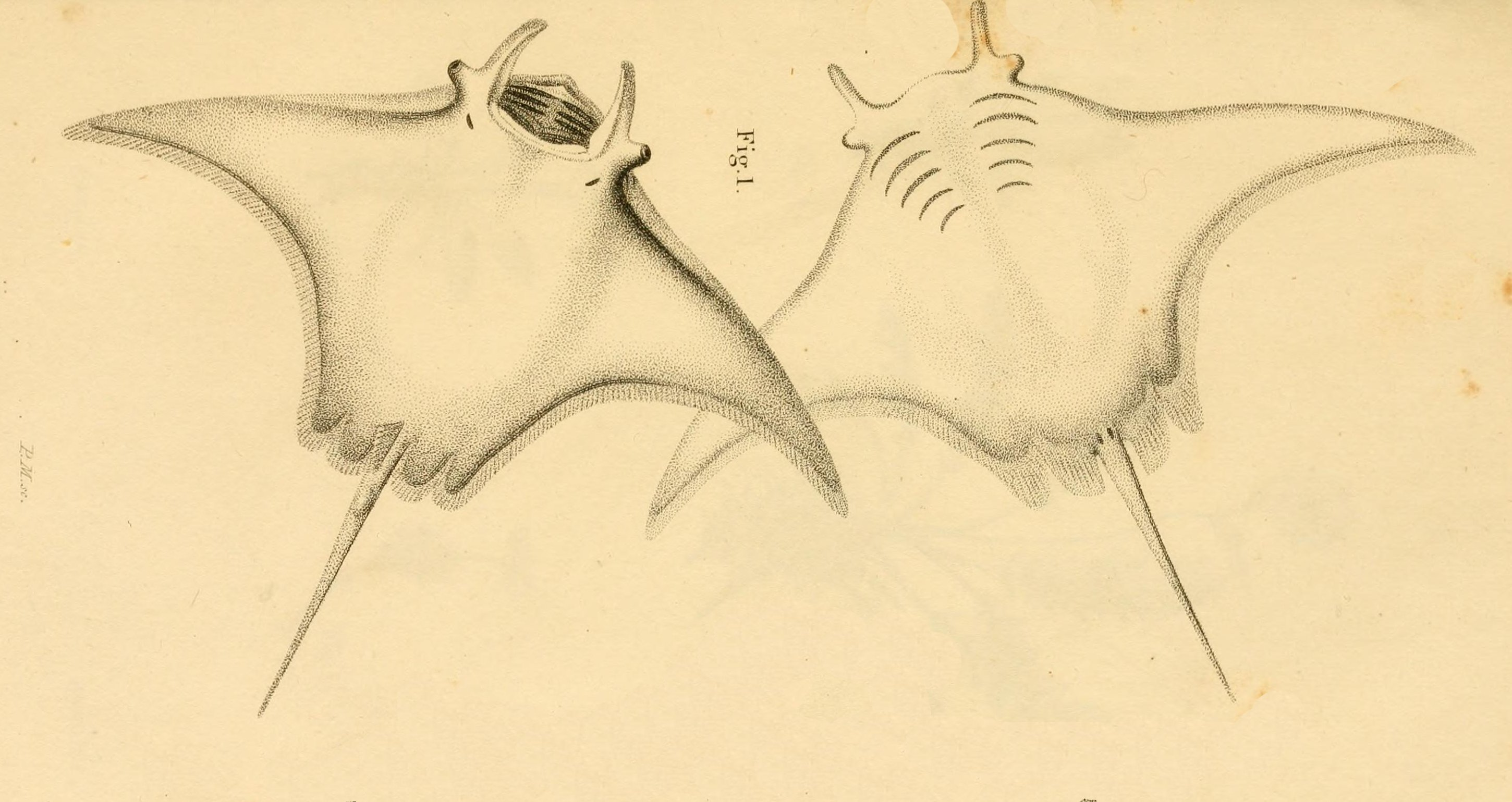 Гигантская манта Manta birostris syn. Cephalopterus vampyrus